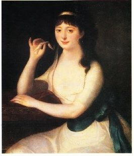 Presunto ritratto di Luigia Pallavicini, quadro ad olio di Anonimo conservato presso la Galleria d'Arte Moderna di Genova-Nervi